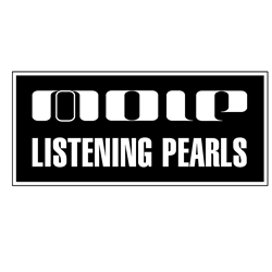 Logo des Labels